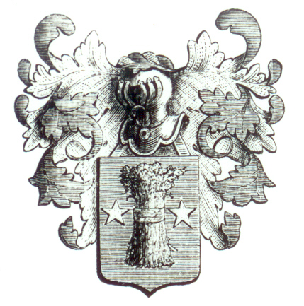 d'azur à la gerbe de blé accostée de deux étoiles, le tout d'or